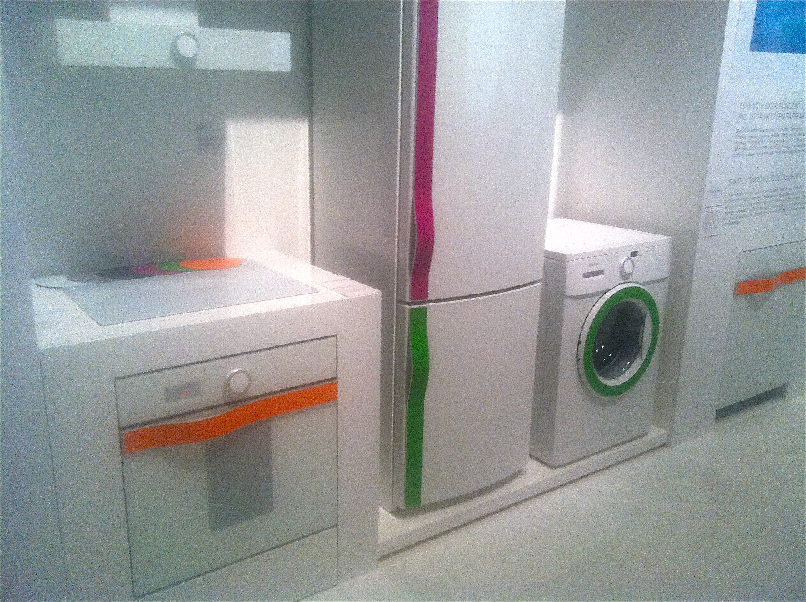 GORENJE